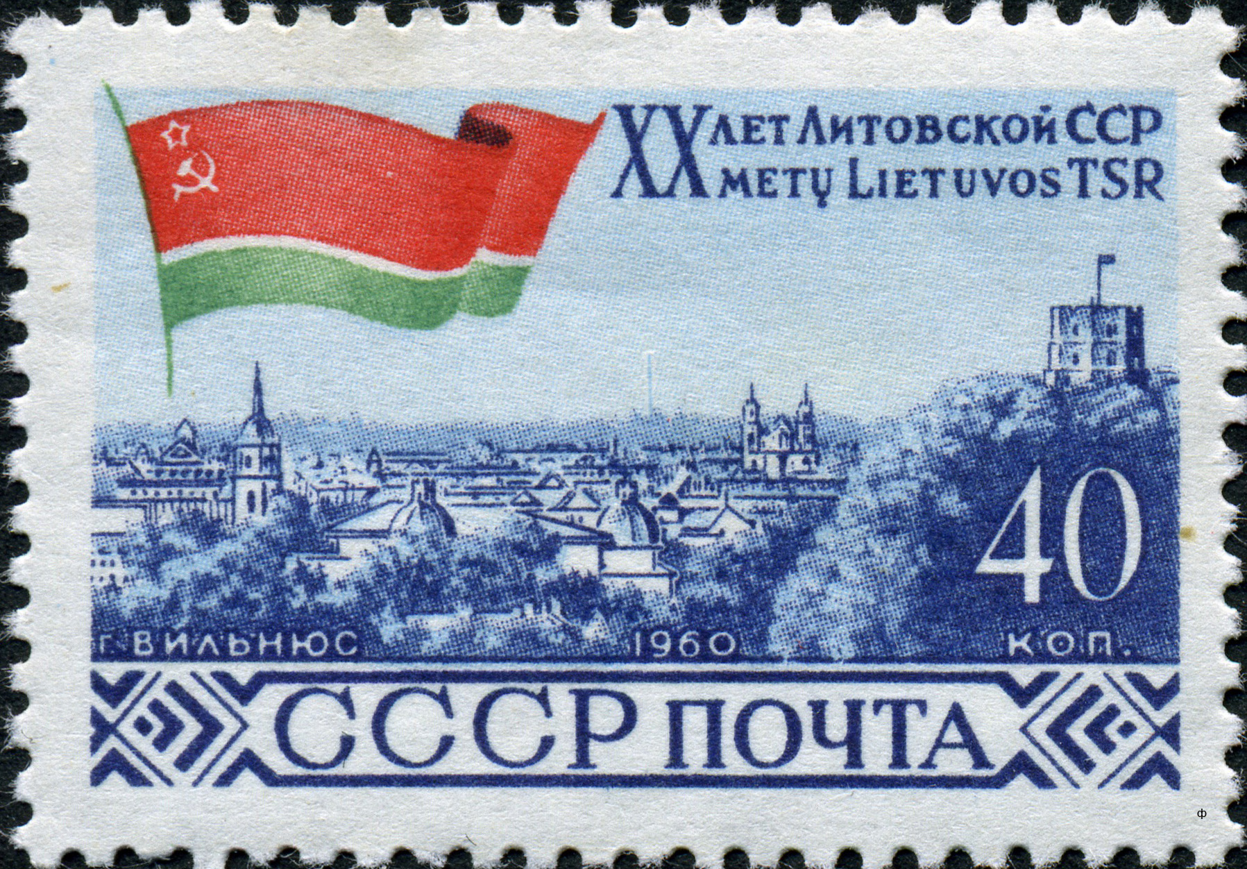 Марка СССР